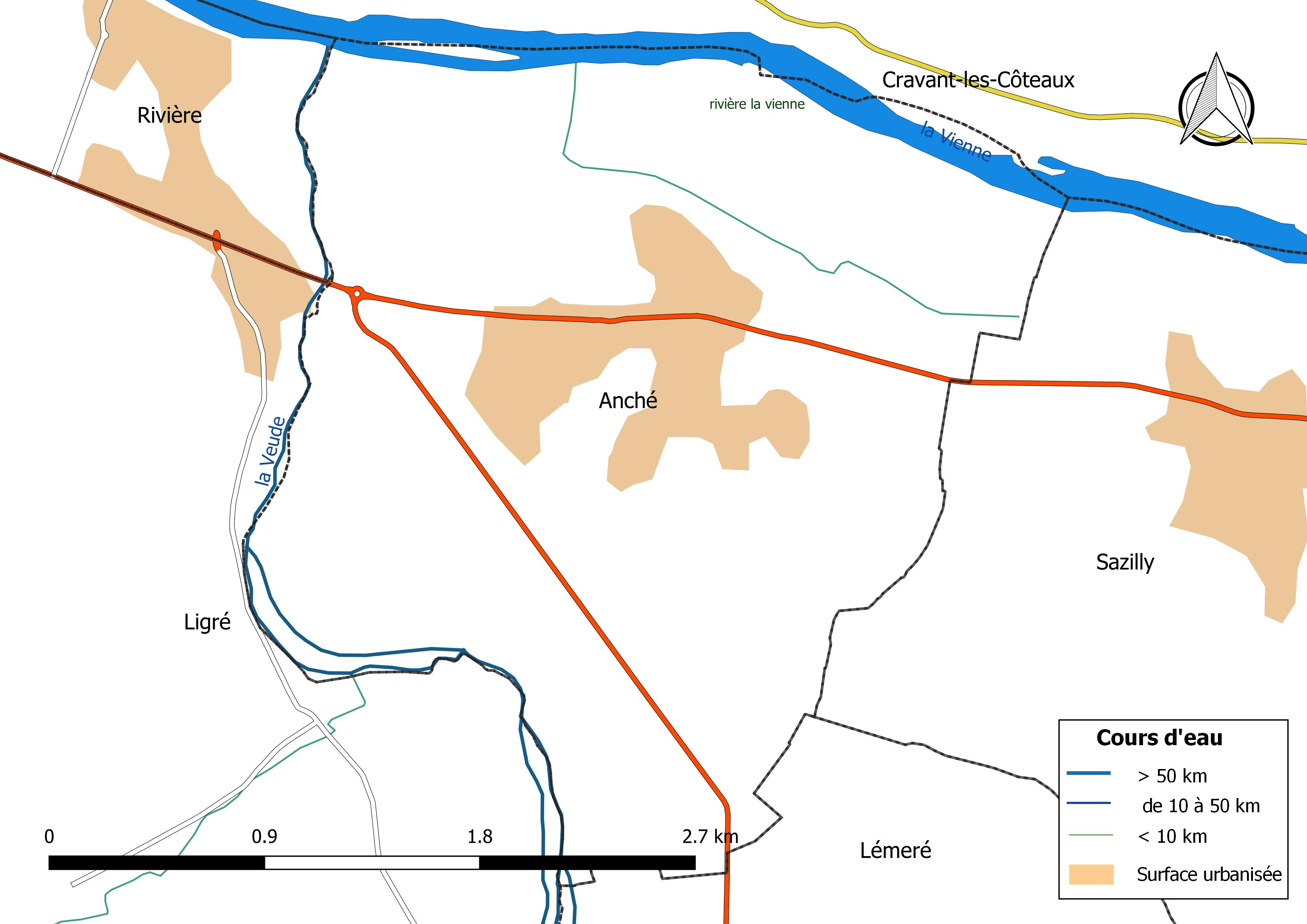 Carte du réseau hydrographique de la commune de Anché (Indre-et-Loire) (France).